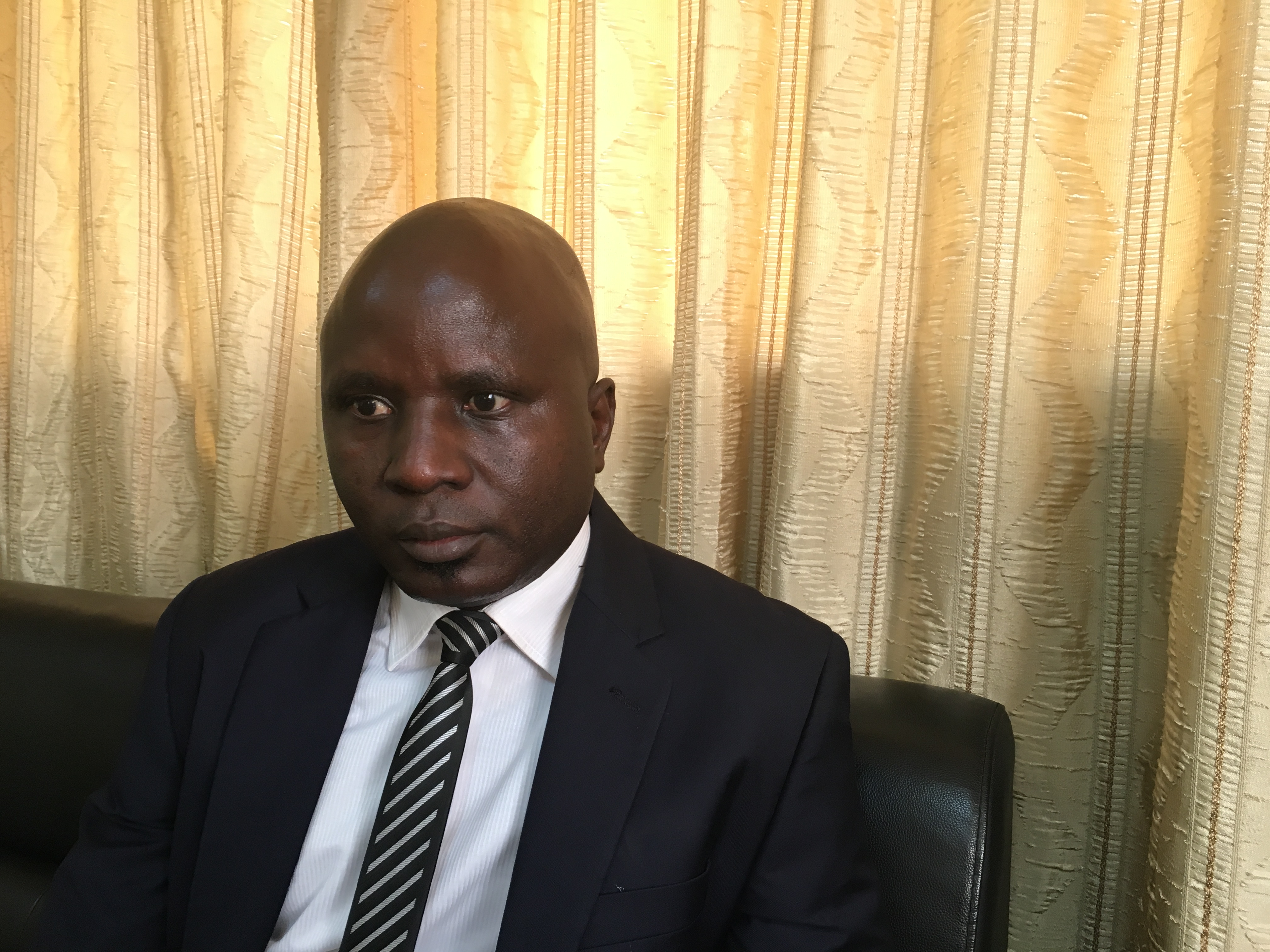 Moussa Sinko Coulibaly, ancien général malien, à Bamako, le 4 décembre 2017. Le général et ancien ministre malien a démissionné de l'armée afin de se présenter à l'élection présidentielle prévue en juillet 2018.